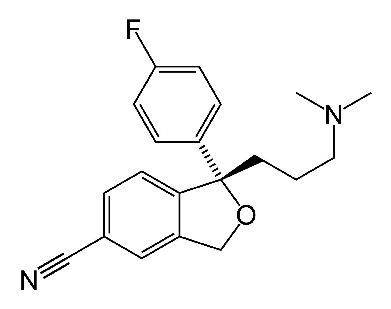 Escitalopram-skeletal